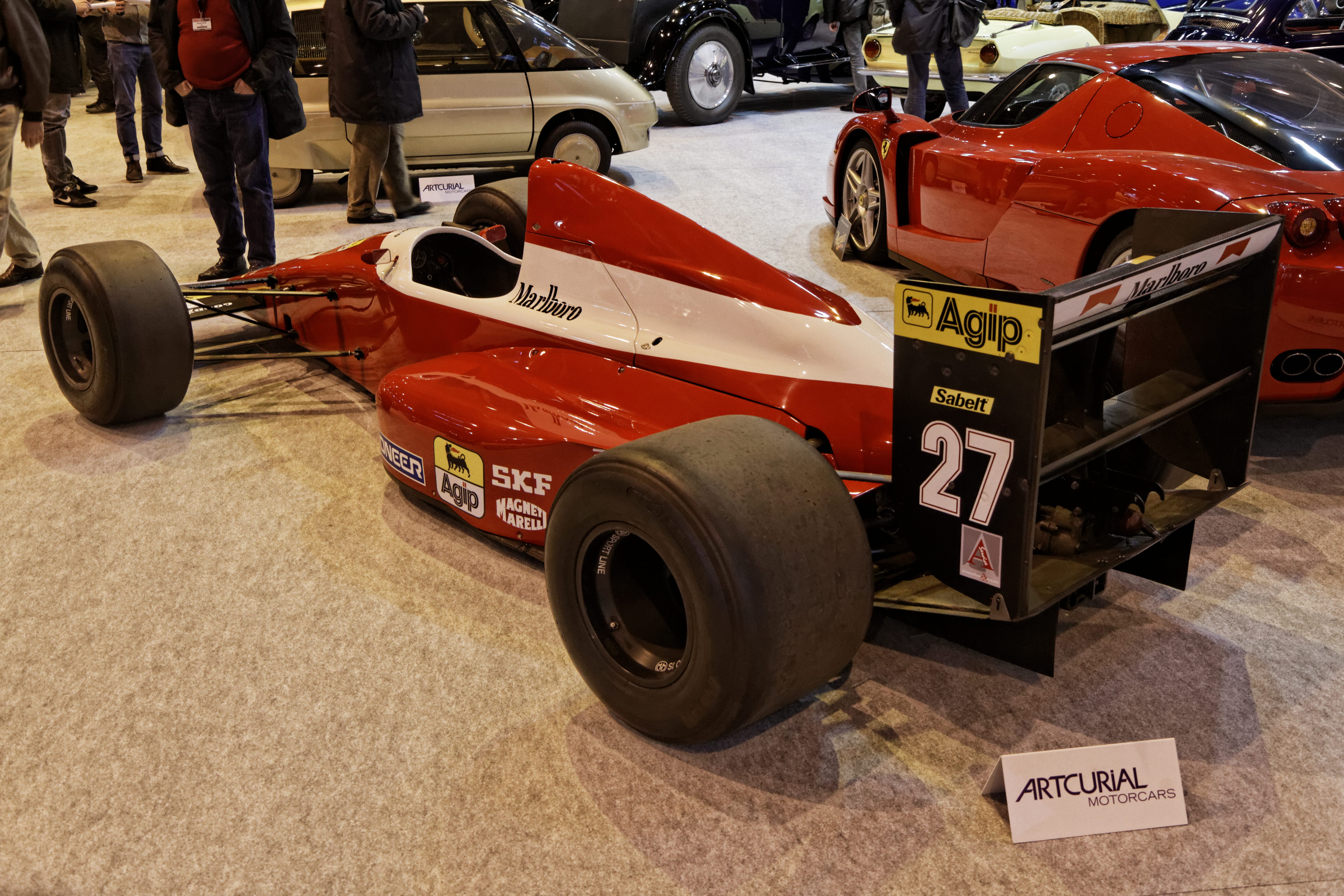 Une BMS Dallara Formule 1 exposée lors du salon Retromobile 2014